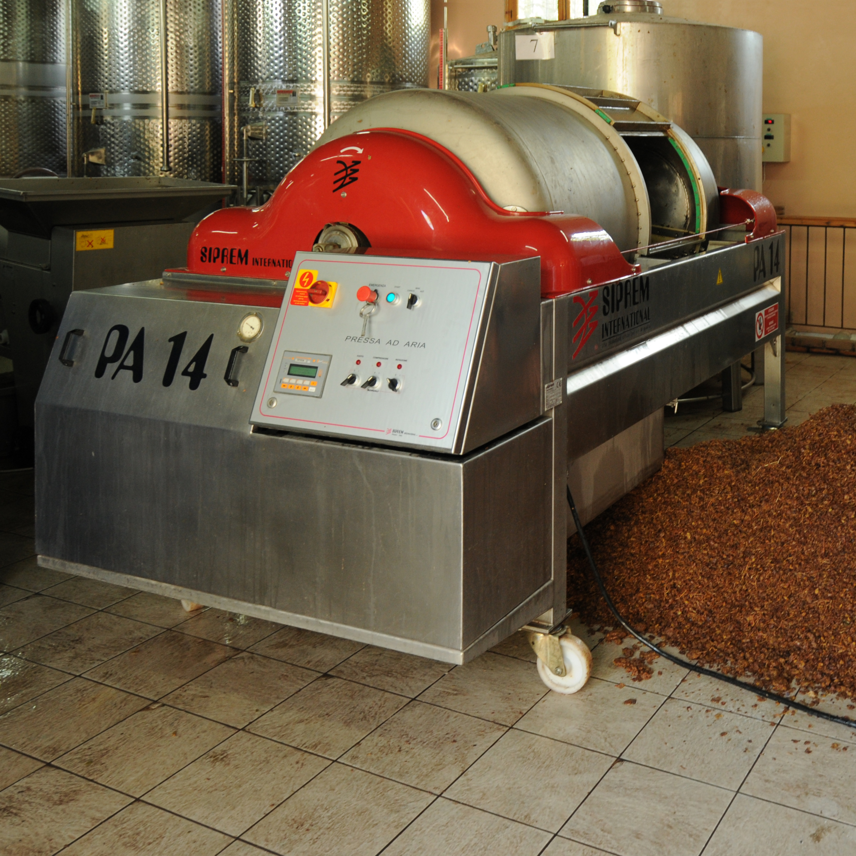 Pressoir pneumatique à membrane horizontale SIPREM de la cave de Silikou